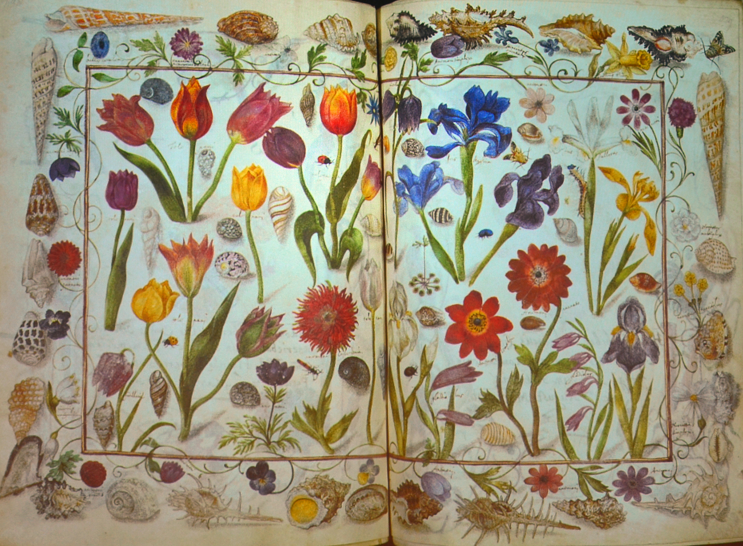 Eintrag im Großen Stammbuch des Philipp Hainhofer, Doppelseite mit Blumen, Insekten, Muscheln